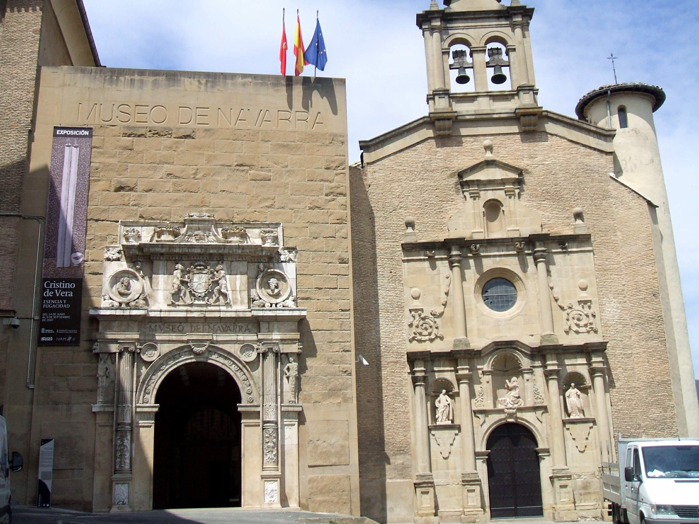 Museo de Navarra (Pamplona)